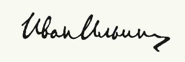 Автограф Ивана Ильина